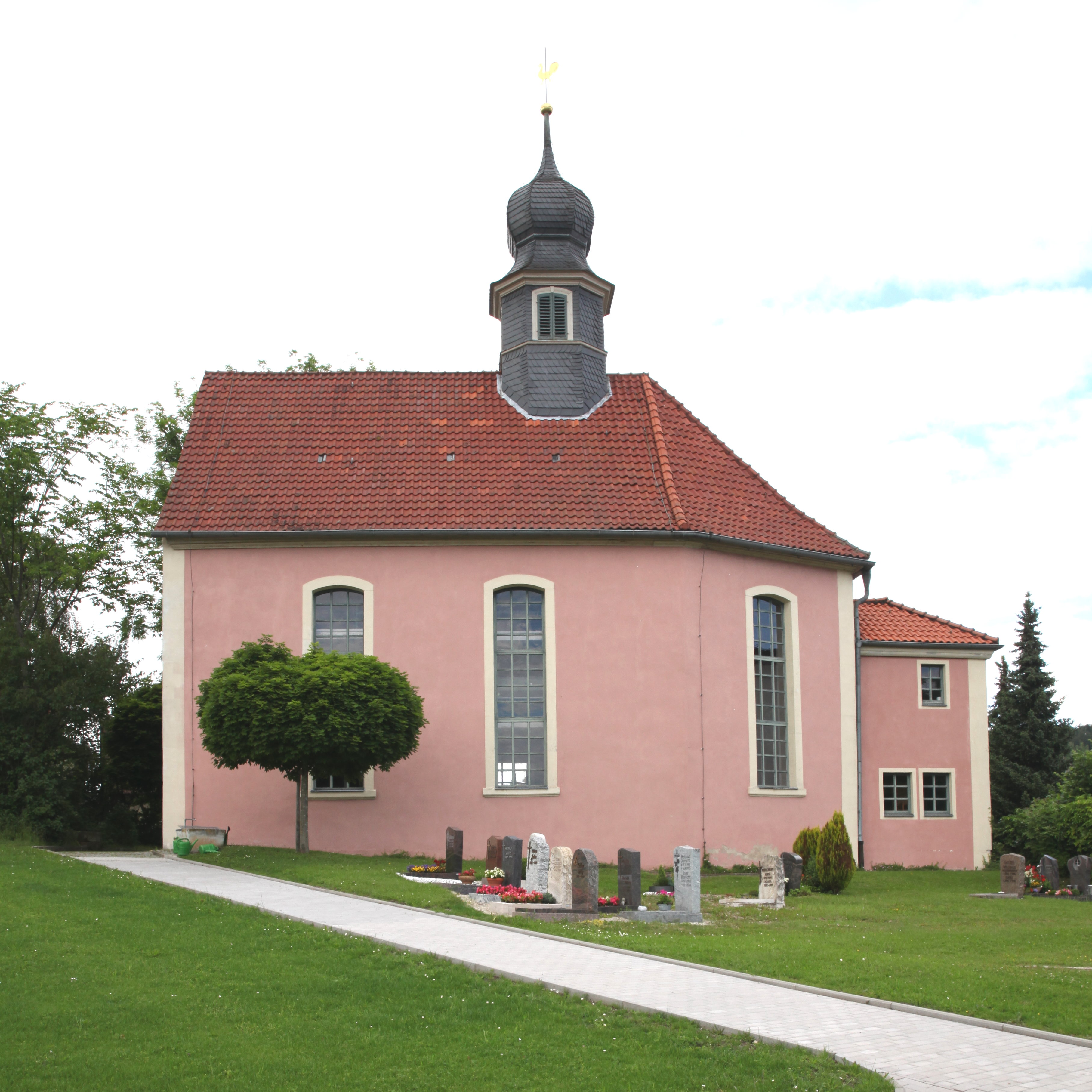 Südseite, Evangelische Kirche St. Nikolaus in Weitramsdorf